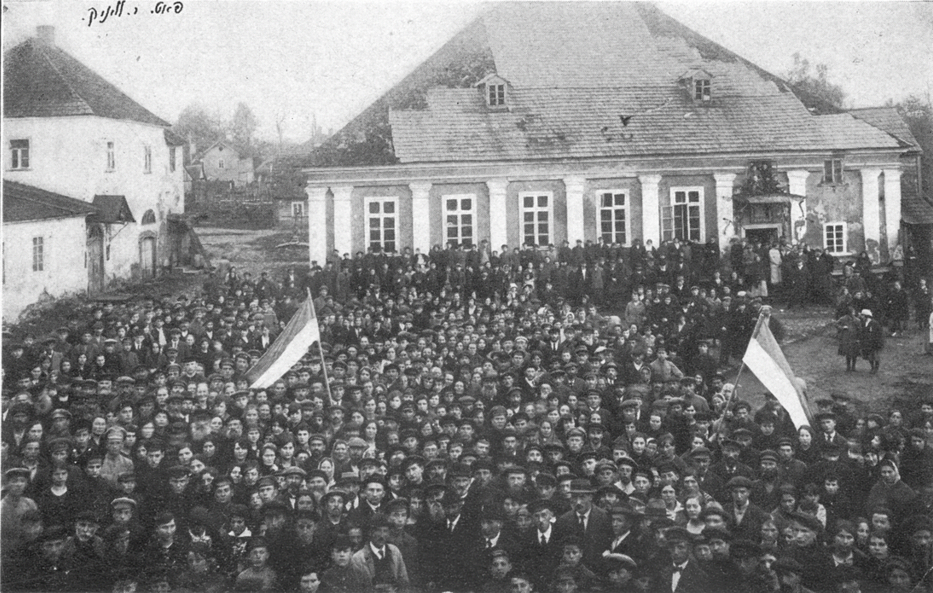 Беларуская (тарашкевіца): Наваградак (Navahradak), Школьны Двор (Školny Dvor). Юдэйская школа